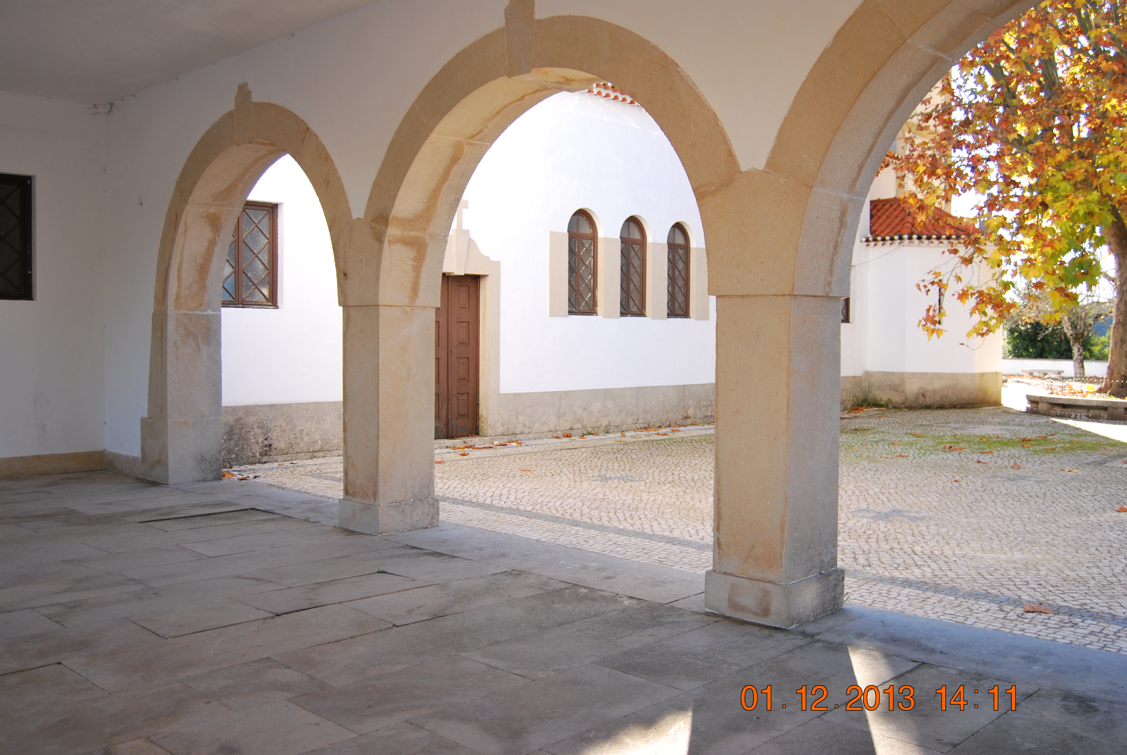 Igreja